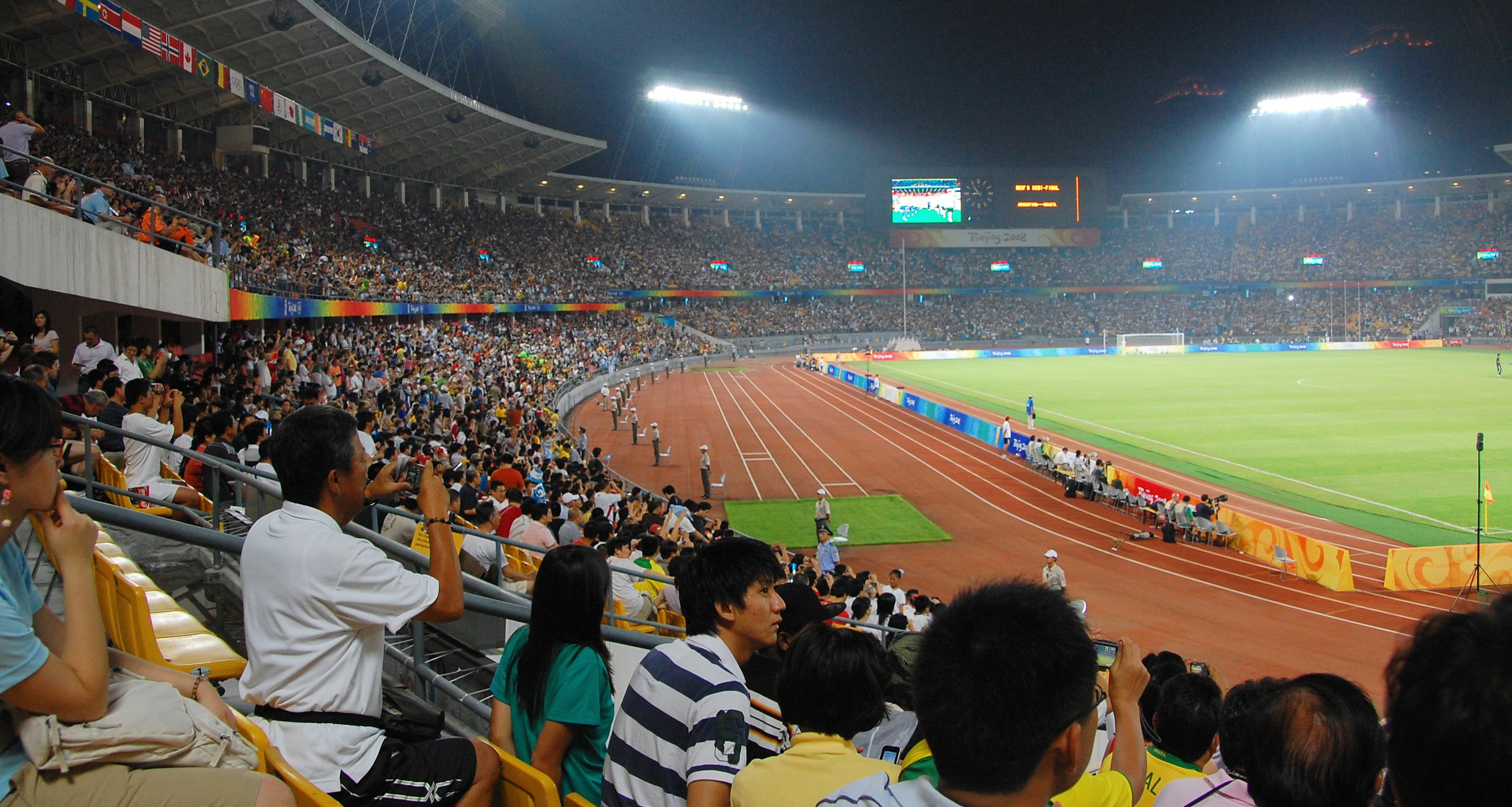 Workers Stadium Beijing